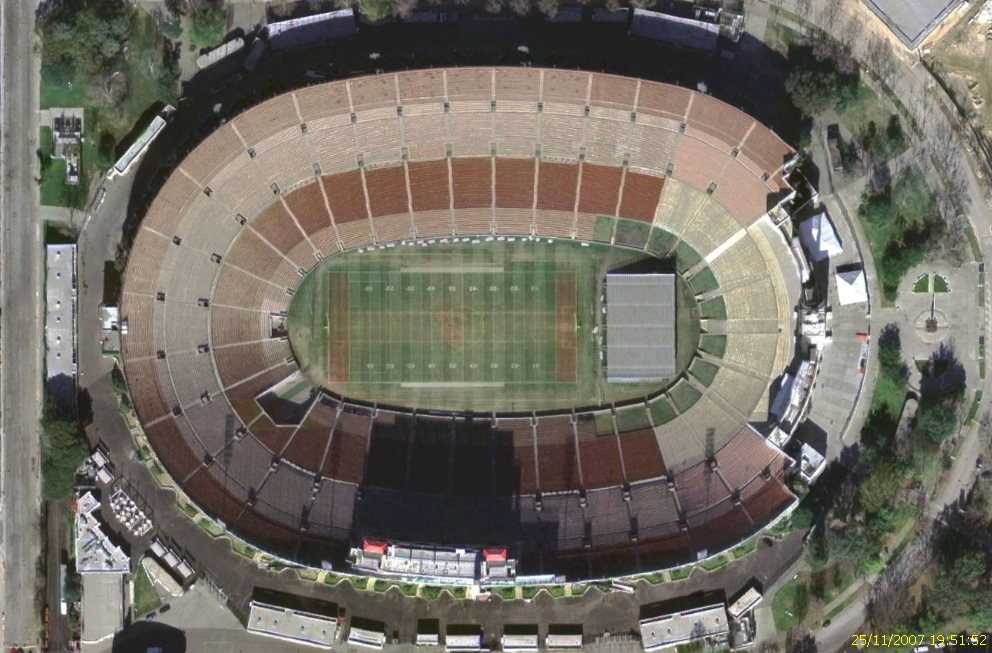 Image satellite du Los Angeles Memorial Coliseum Image satellite USGS provenant de Nasa World Wind